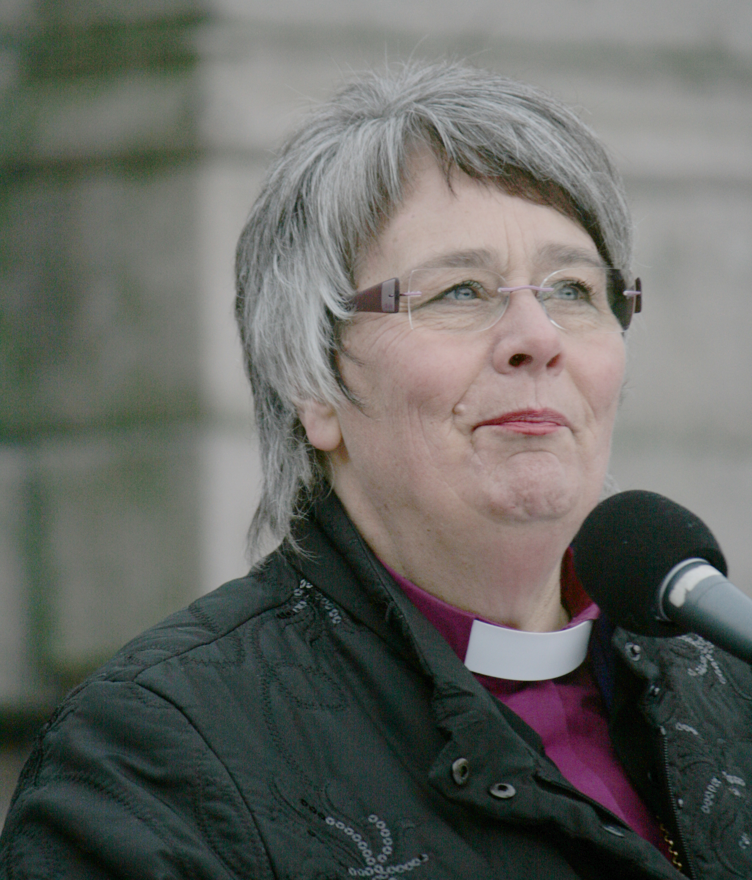 Biskop i Hamar Solveig Fiske holdt appell ved demonstrasjonen mot utsendelsen av papirløse Maria Amelie 22. januar 2011.